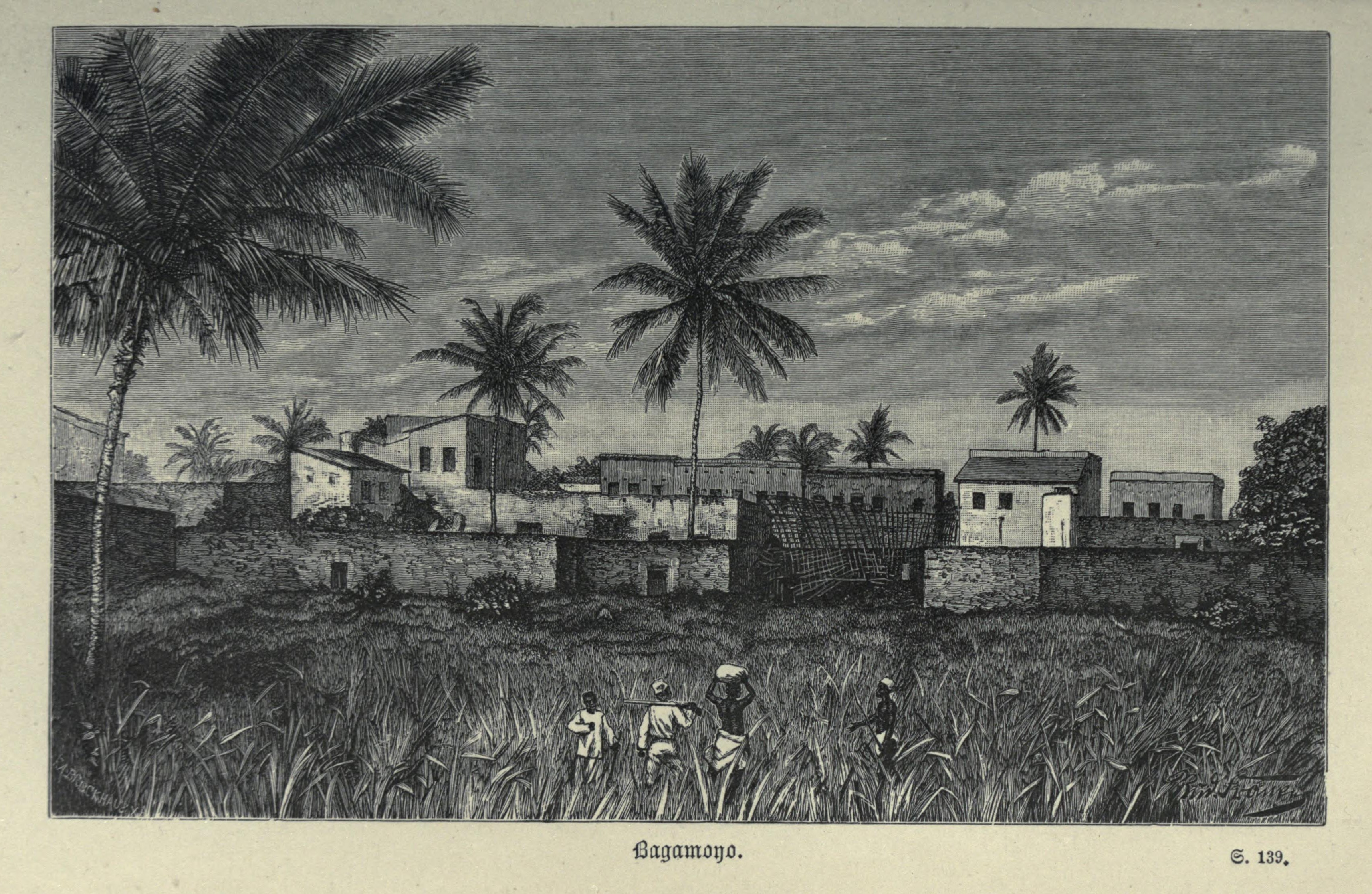 Bagamoyo